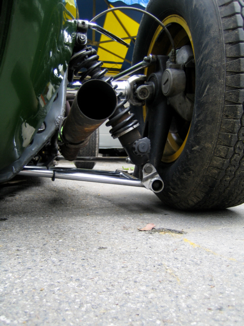 Lotus 18 rear suspension detail Pau GP 2007